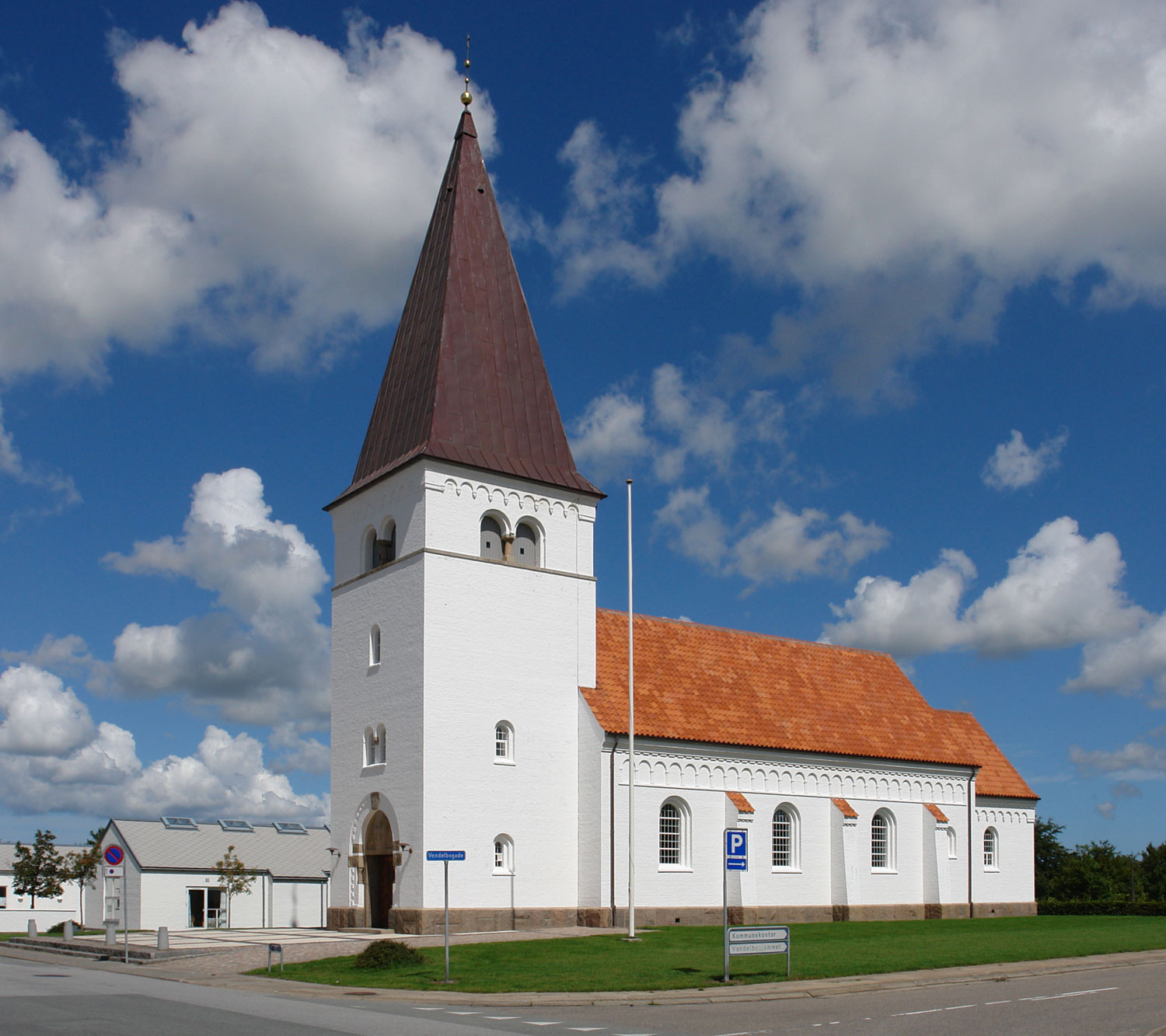 Stadtkirche von Sindal (Sindal Bykirke), stammt aus dem Jahr 1910